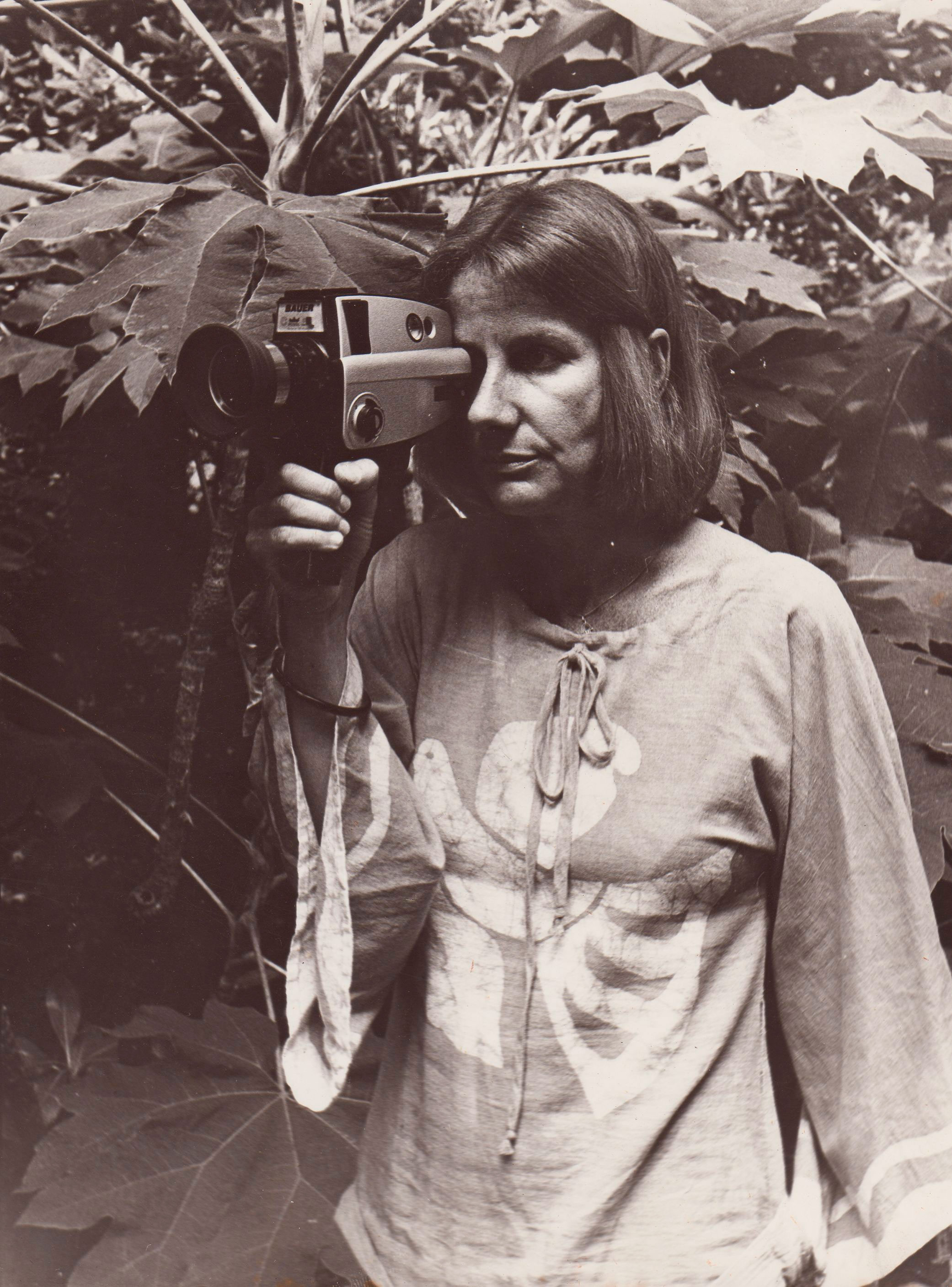 SUPER 8